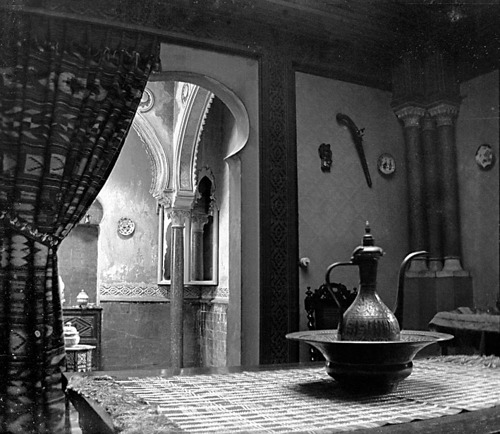 décor mauresque datant de 1865 de l'entée de l'atelier de sculpture de Charles Cordier 115, Boulevard Saint-Michel Paris 5ème